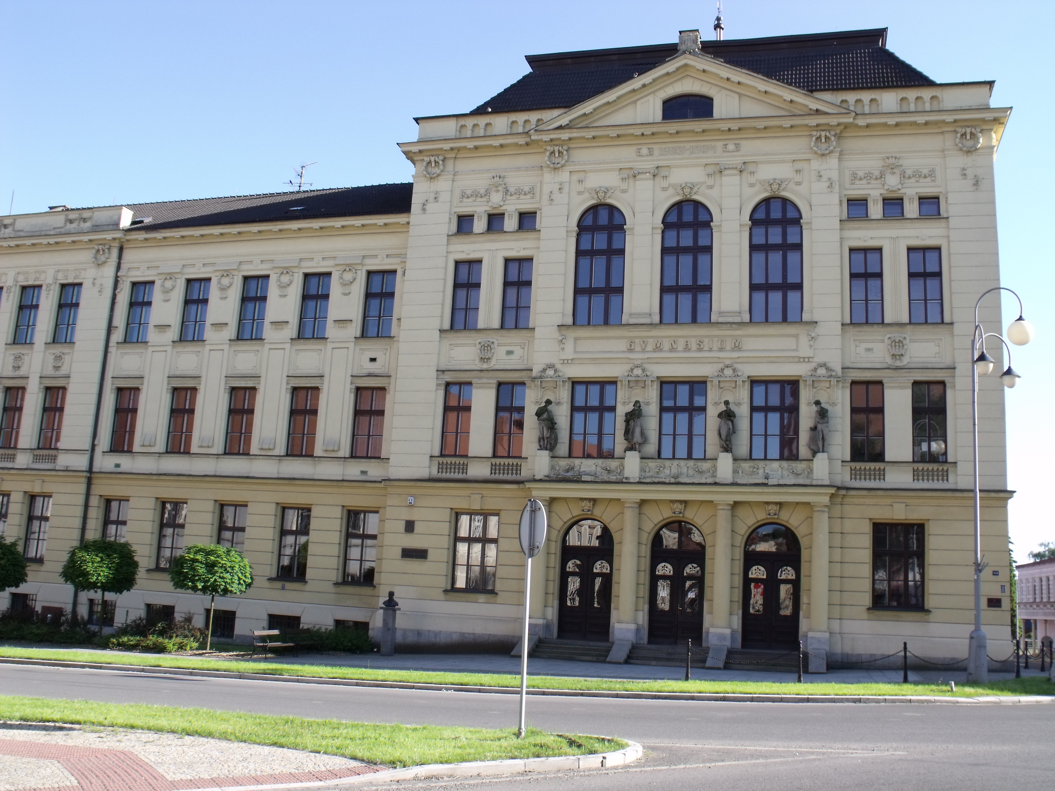 Budova Masarykova gymnázia v Příboře. Průčelí zdobí čtyři sochy Františka Úprky